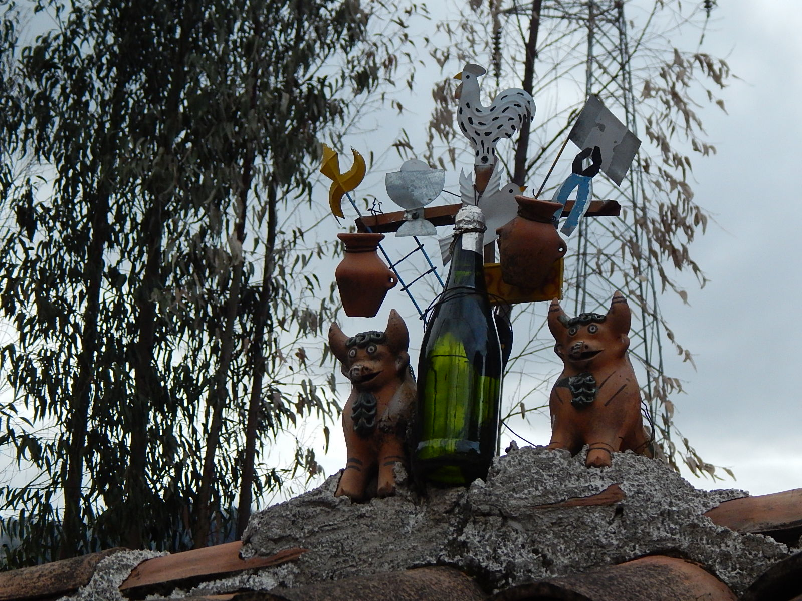 Una muestra del sincretismo entre la religión y la cultura originaria en Cusco. Los bueyes de la abundancia en Cusco (Perú)